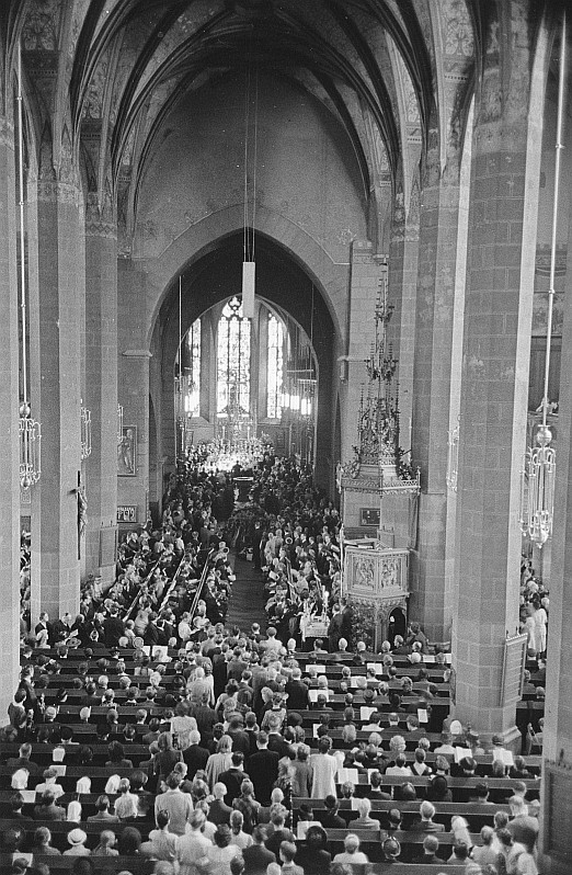 Original image description from the Deutsche Fotothek Besucher der Messe in der Thomaskirche zu Ehren Bachs